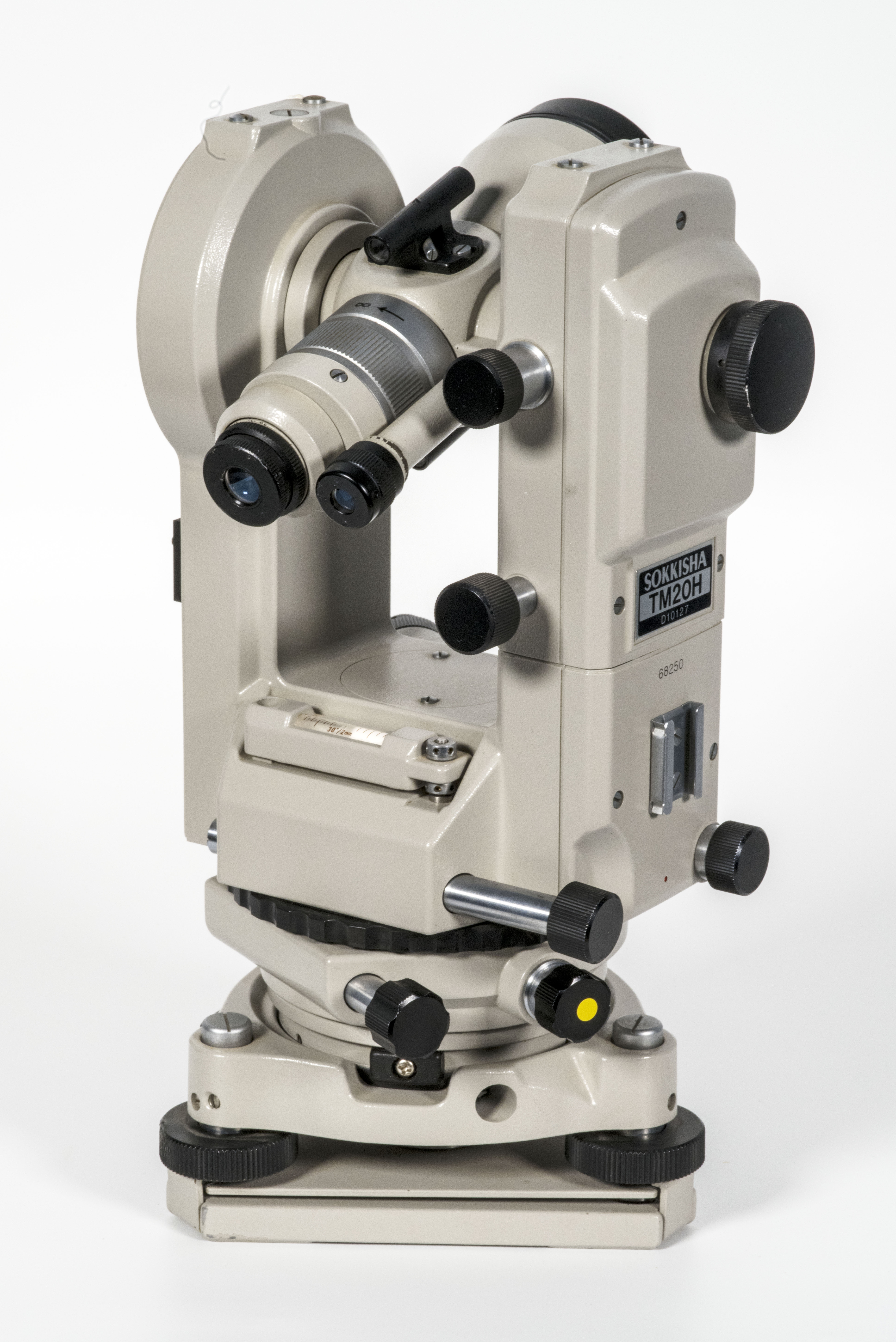 Instrumento de la colección del Centro Universitario de Mérida, Universidad de Extremadura, España.